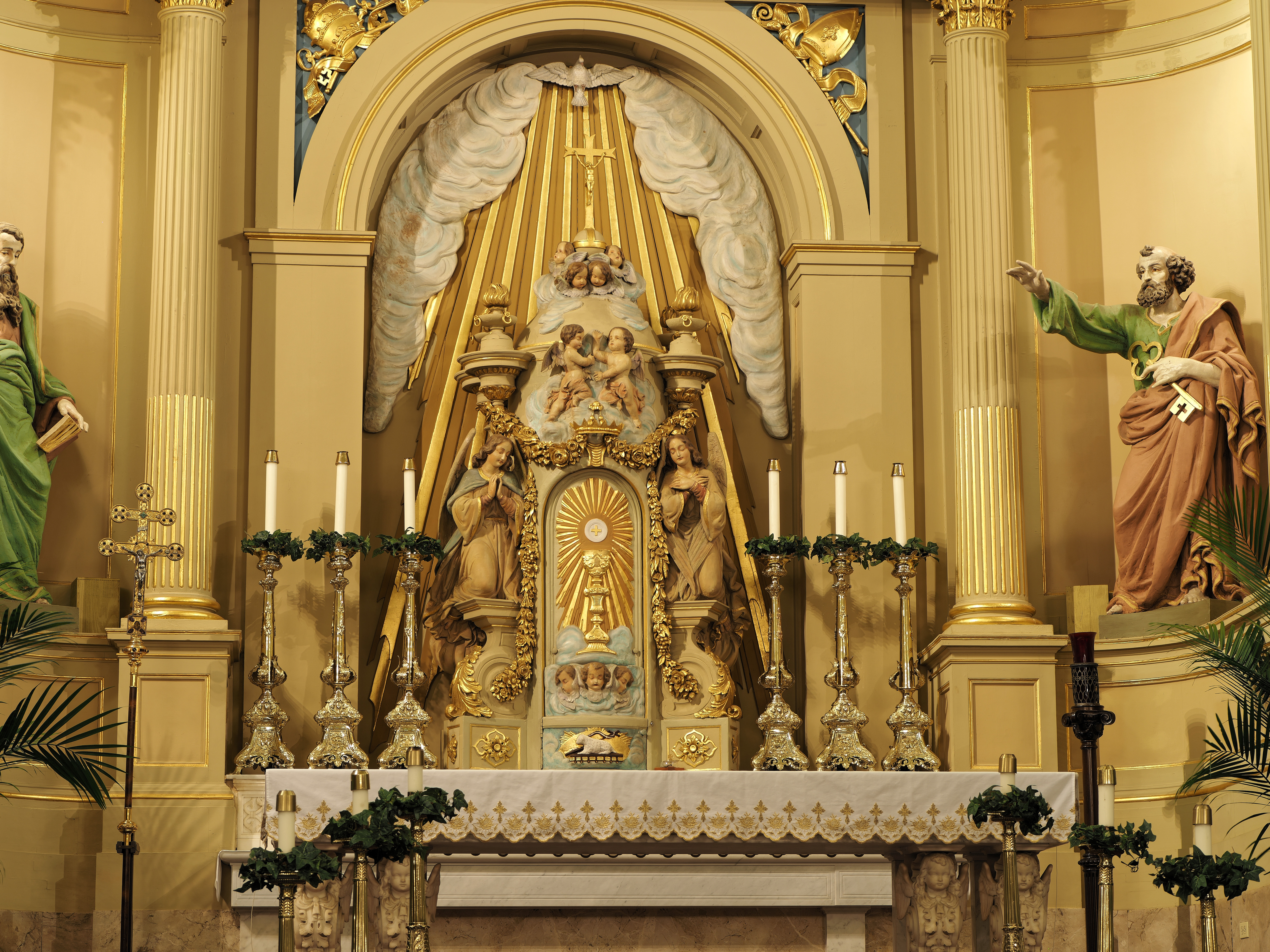 Altar in der Kirche Cathedral-Basilica of Saint Louis King of France (Basilica minor) in New Orleans, Luisiana, USA.